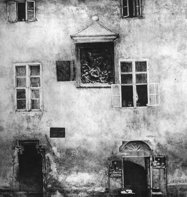 Północna ściana domu przy Placu Mariackim z płaskorzeźbą "Chrystus w Ogrojcu" Wita Stwosza